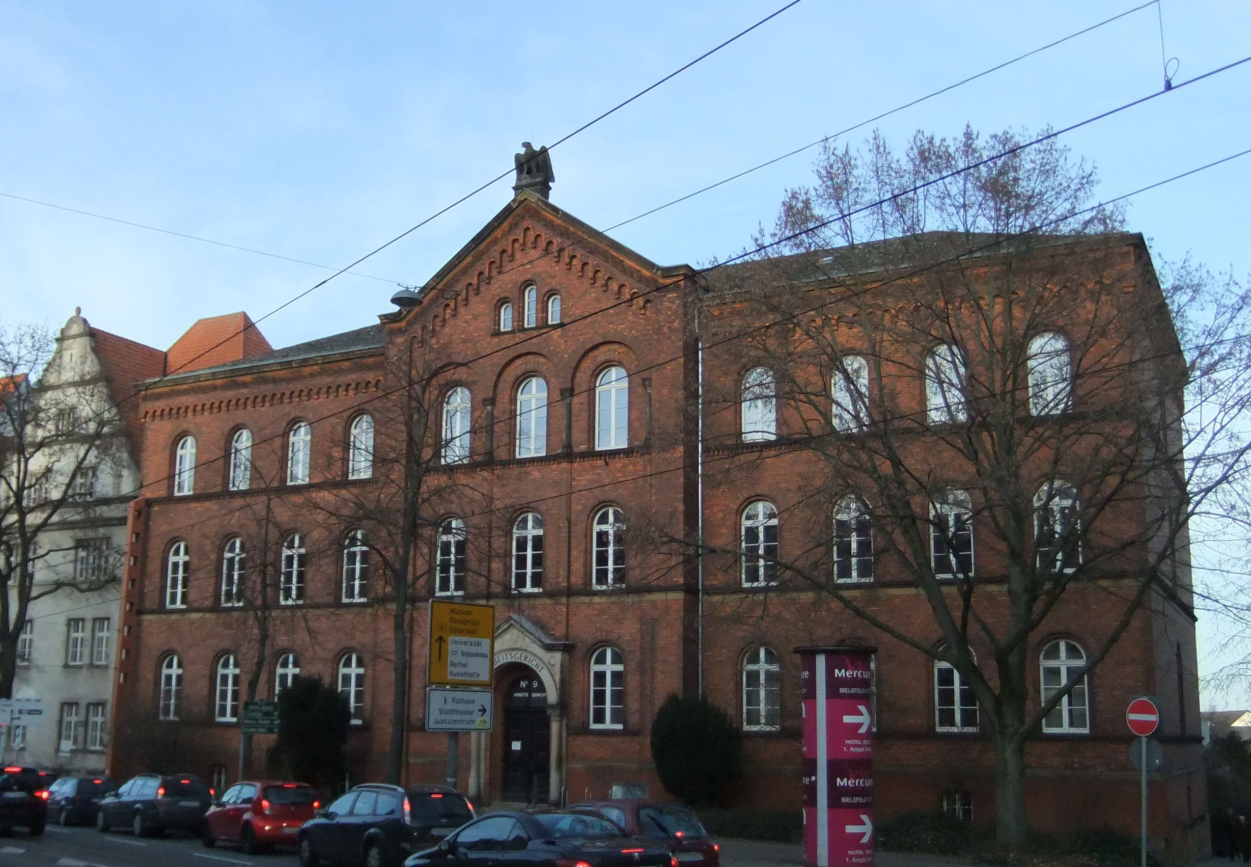 Denkmal Detmolder Straße 9 in Bielefeld. Arbeitsgericht.